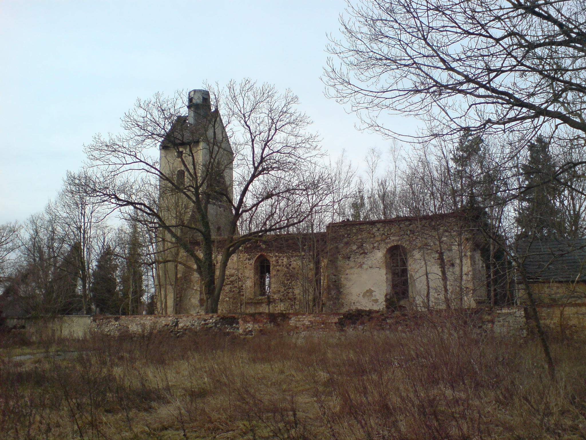 Ruiny kościoła ewangelickiego w Ruszowie